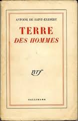 Terre des Hommes, par Antoine de Saint-Exupéry.